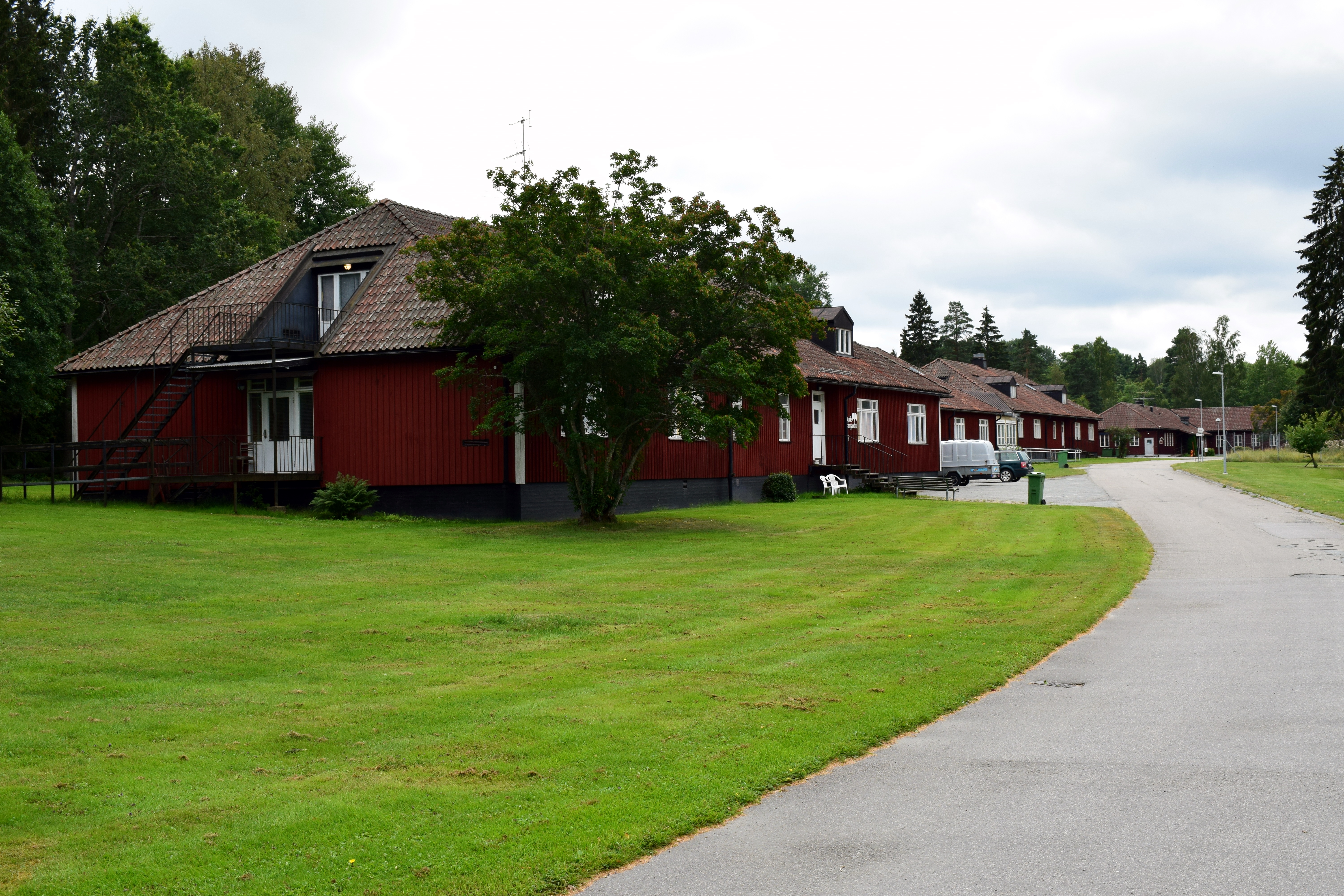 Byggnaderna uppfördes ursprungligen som kaserner till Göta trängregementes kompani i Nora. Kasernerna är uppförda som plutonskaserner i ett plan med källarvåning. Varje kasern bestod av åtta logement med en genomgående korridor och hade förläggningsutrymme för 48 personer plus fyra furier fördelade på två underbefälsrum. Kasernbyggnad 3 kallades för Främlingslegionen, det på grund av att den inhyste värnpliktiga som inte kom från ett trängförband. Bilden föreställer kasernerna med matsalsbyggnaden längst bort.